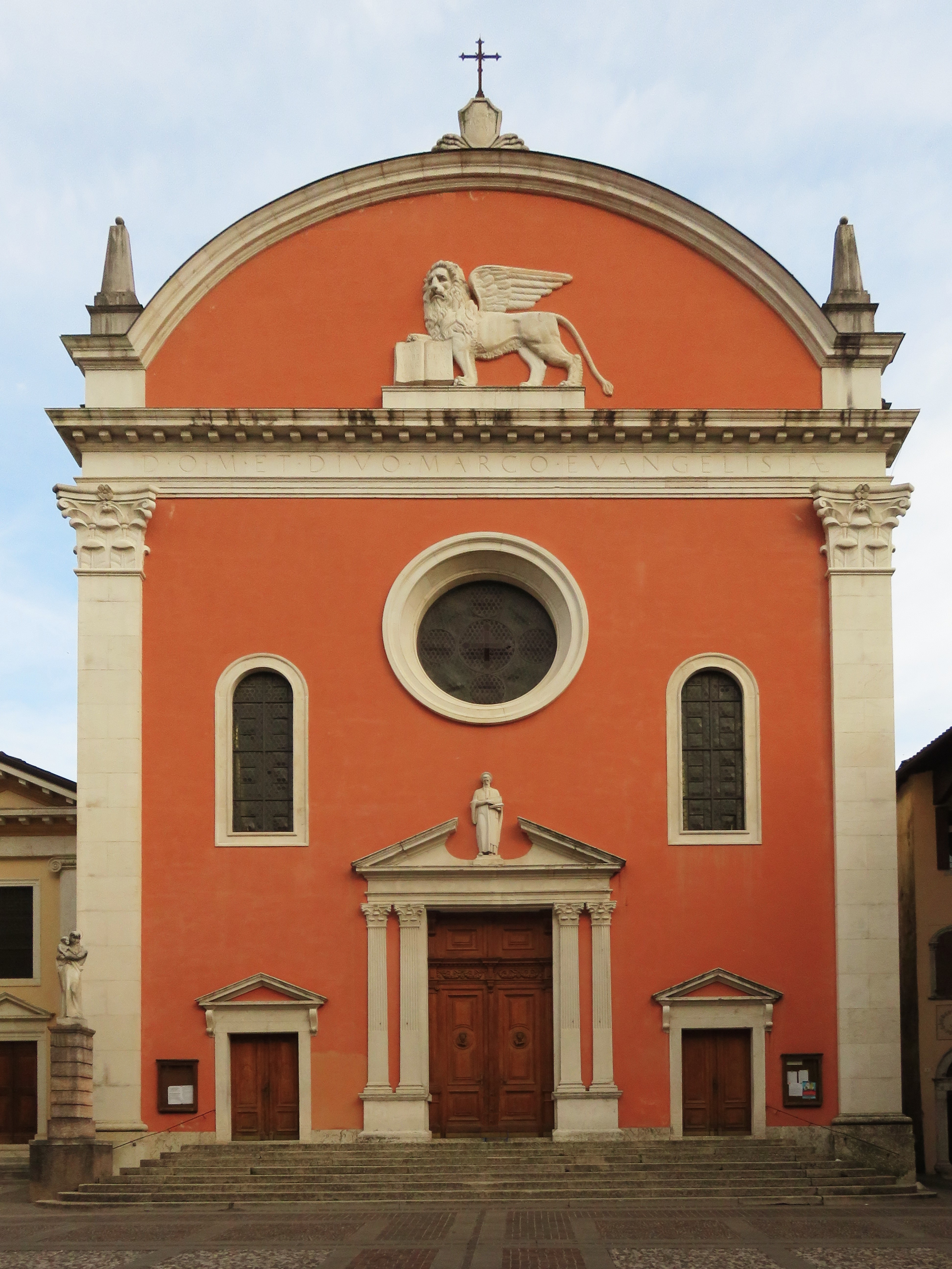 Facciata della chiesa di San Marco a Rovereto